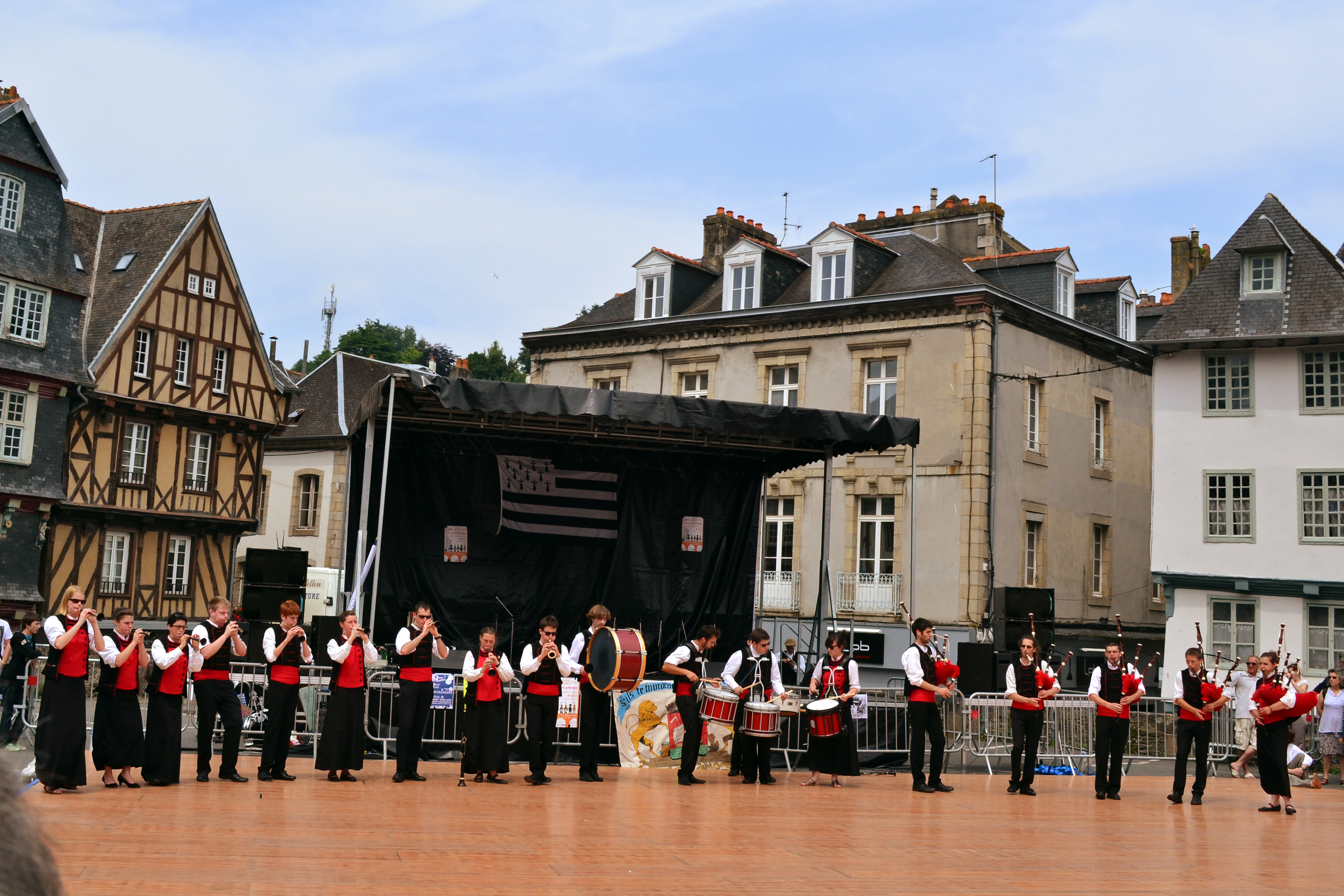 Le Bagad Sonerien Bro Montroulez lors de la Journée Bretonne du dimanche 7 juillet 2013 à Morlaix.